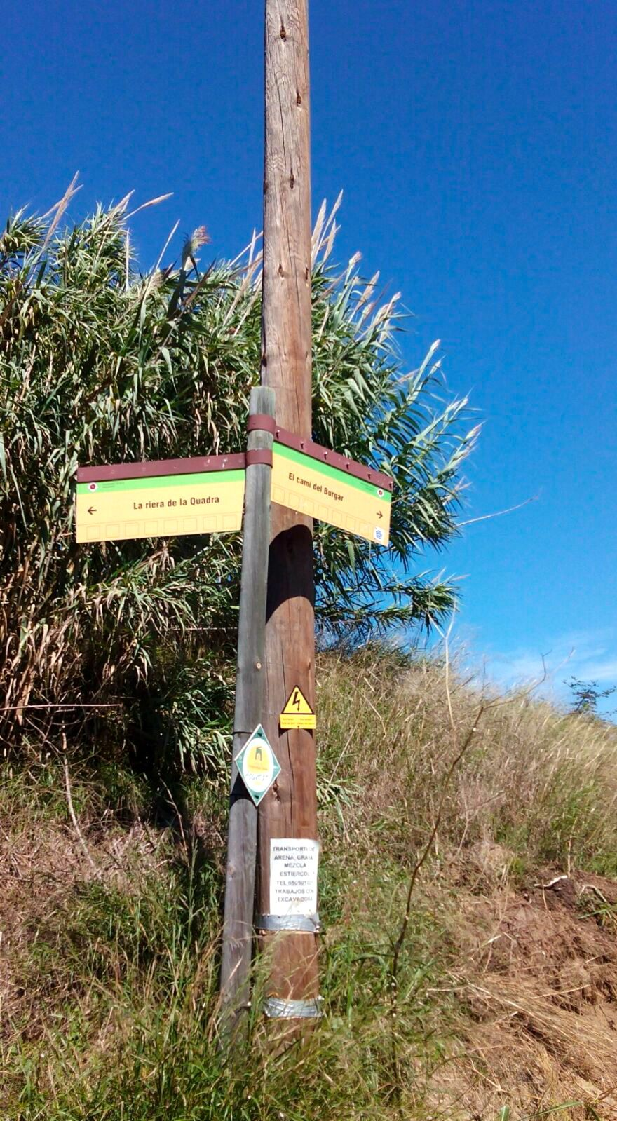 Encreuament del camí del Burgar amb la riera de la Quadra, al terme de Reus